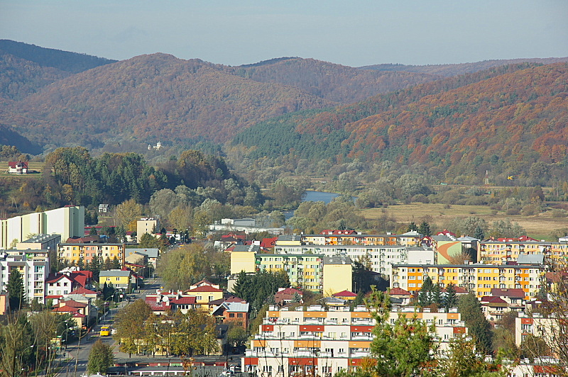 Widok na dzielnicę Wójtostwo w Sanoku z Góry Parkowej, w tle San i Góry Słonne